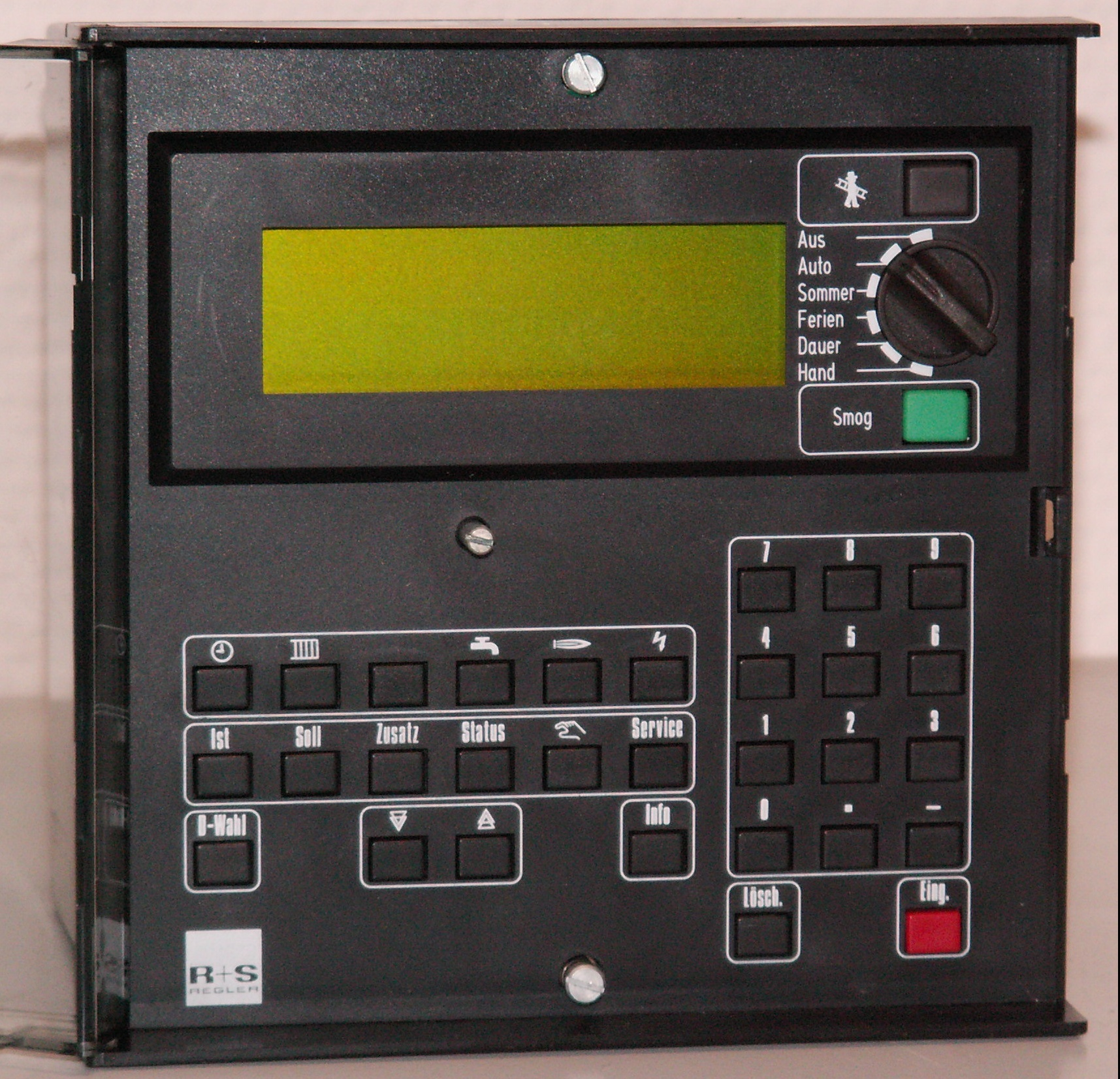 Kompaktregler vom Typ RU 5X der Firma: R+S für Heizungsanlagen. Der Regler ist im ausgeschalteten Zustand aufgenommen worden und befindet sich normalerweise in der Schaltschranktür eingebaut. Auf der Rückseite befinden sich die Kontaktleisten.